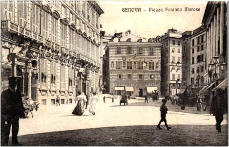 Cartolina della Piazza Fontane Marose a Genova datata 1910